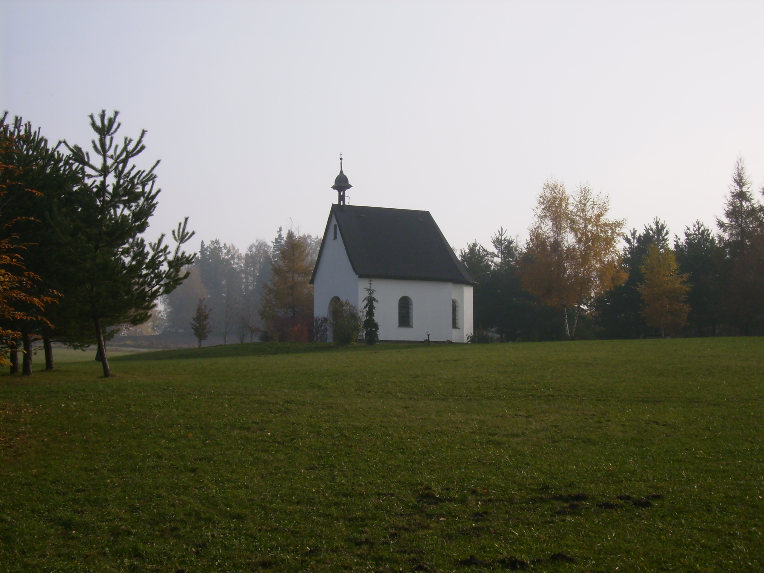 Rokole - Schoenstadská kaple